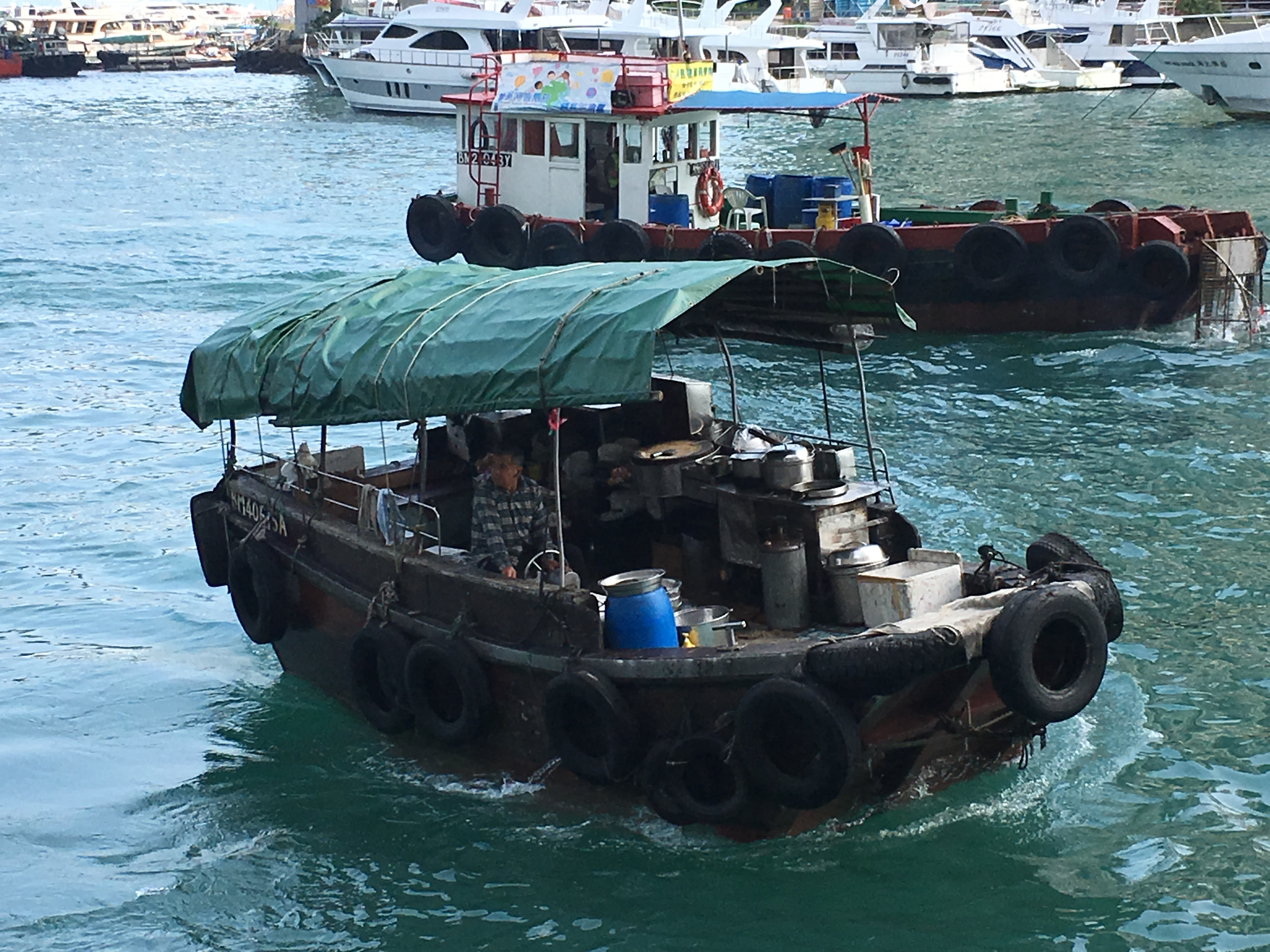 中文（香港）: This photo is taken in Aberdeen.